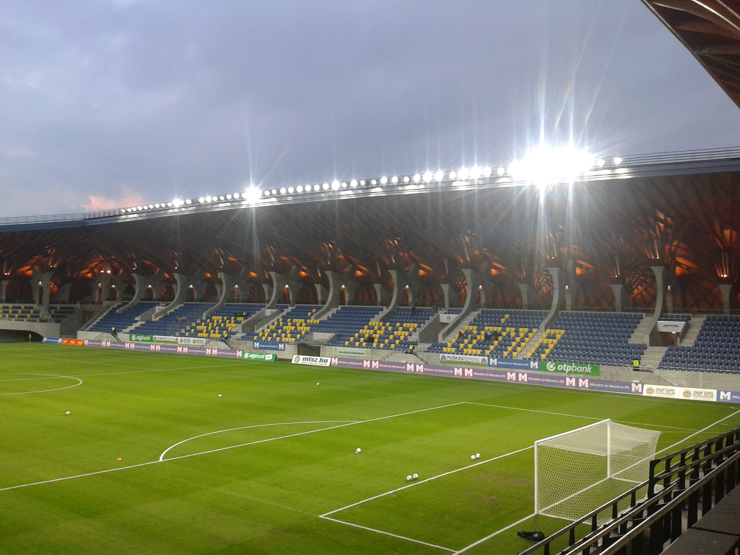 Stadion des Puskas Akademia FC